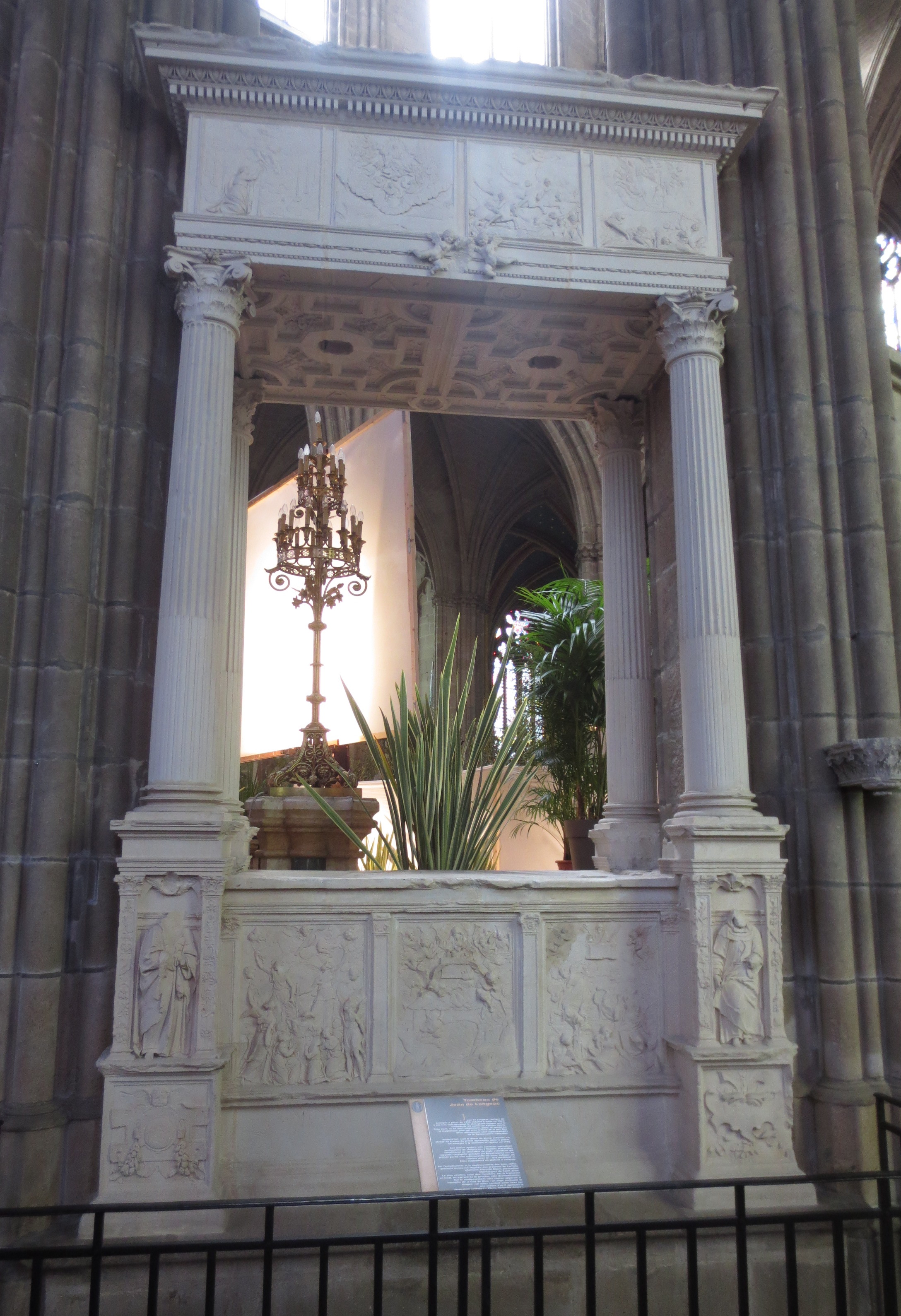 Cathédrale Saint-Etienne de Limoges, tombeau de Jean de Langeac accolé au chœur, vu depuis le déambulatoire.